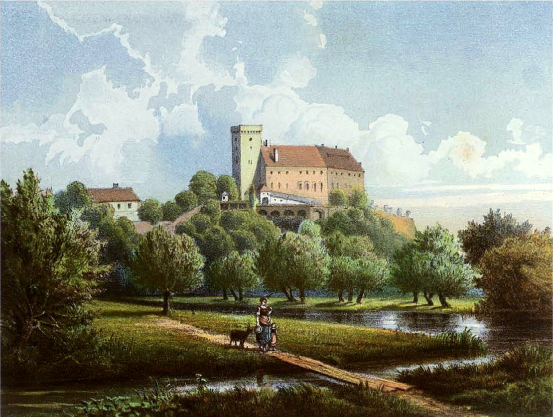 Schloss Ottmachau, Lithografie aus dem 19. Jahrhundert